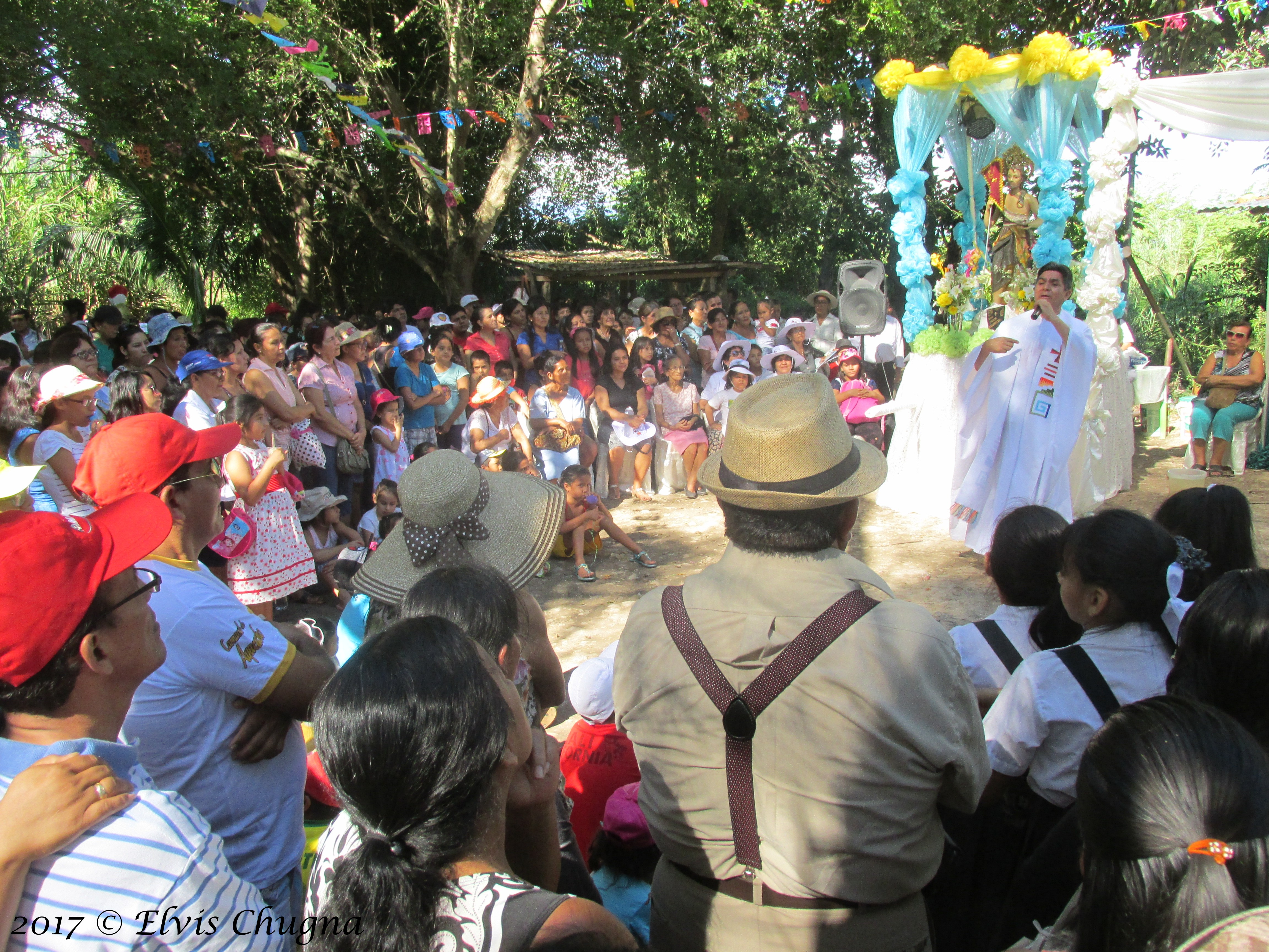 Undetermined language : En puerto Victoria luego de la procesión